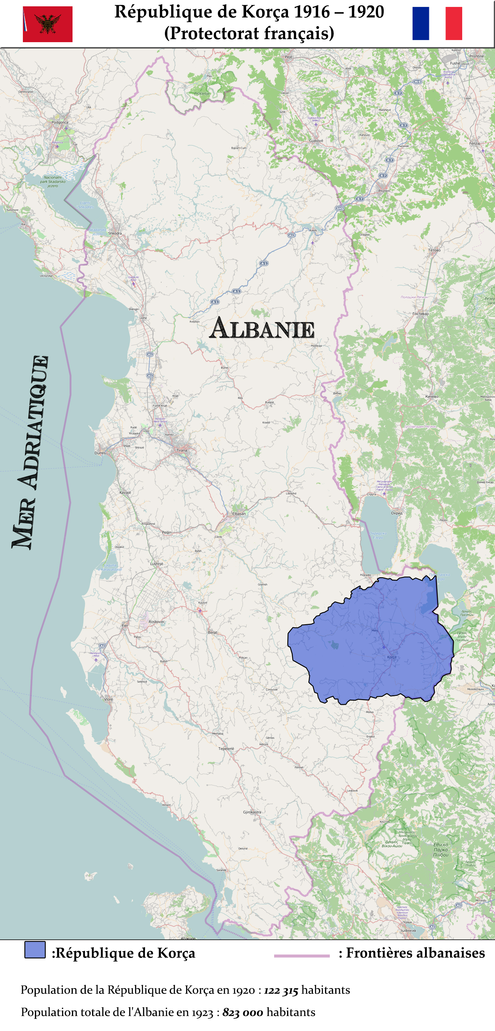 République de Korça 1916-1920